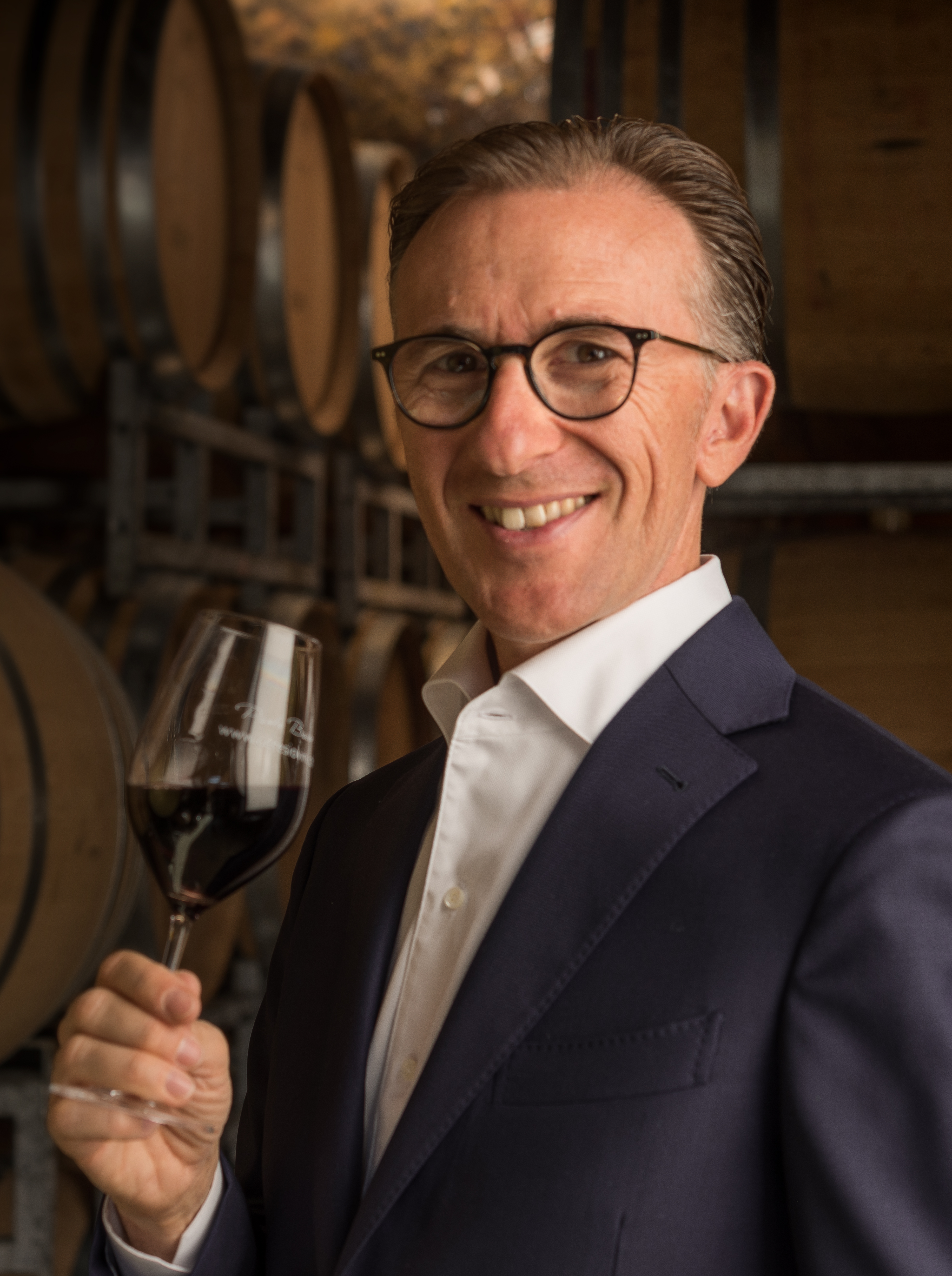 Paolo Basso Sommelier World Champion 2013